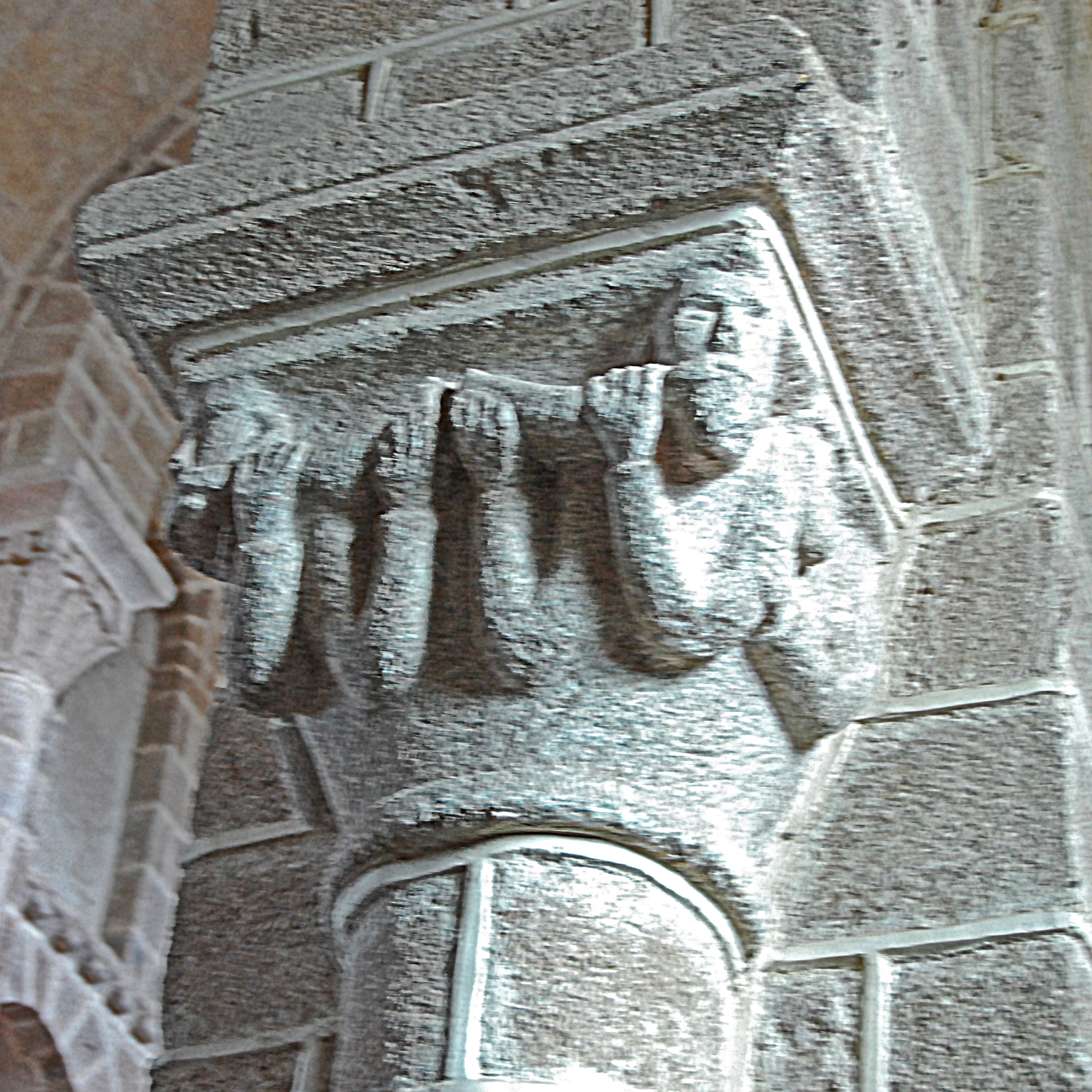 N.-D. de Châtel-Montagne, Kapitell Langhaus, Olifantenbläser